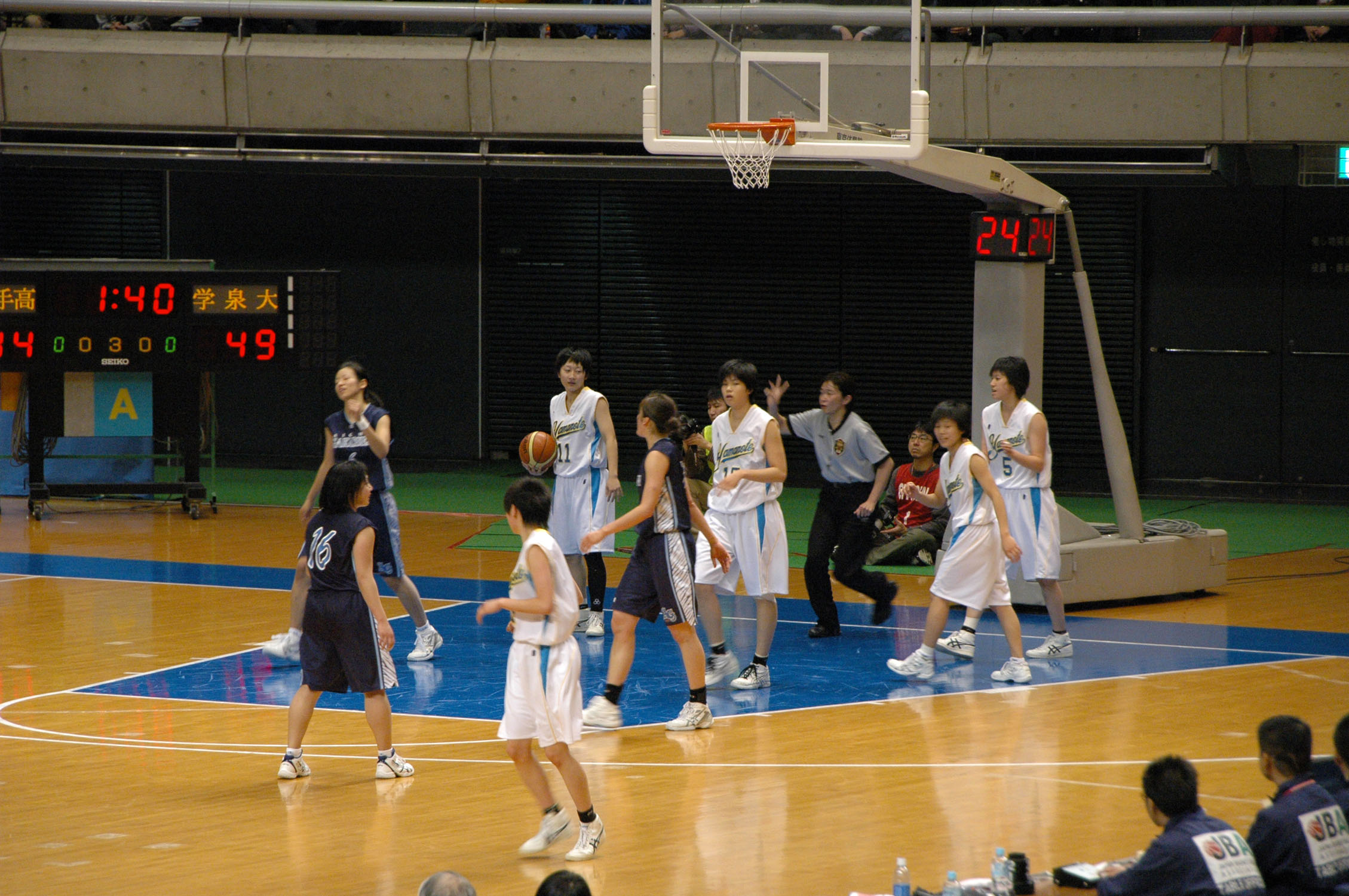 2011年全日本総合バスケットボール選手権大会2回戦、愛知学泉大学対札幌山の手高。東京体育館で。